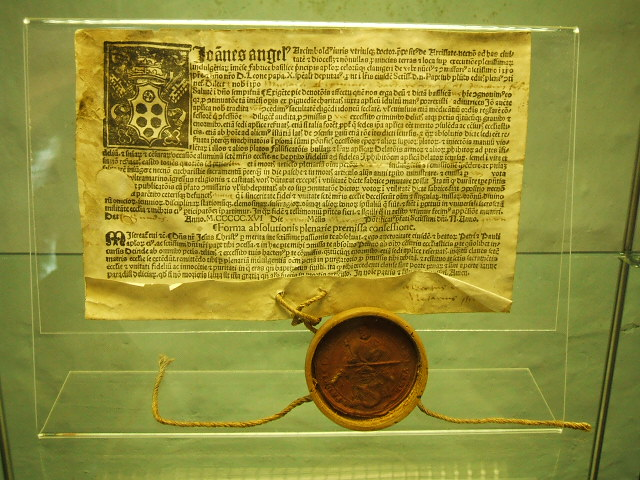 Das Foto zeigt Exponate im Kulturhistorischen Museum in Stralsund in Stralsund im März 2007.